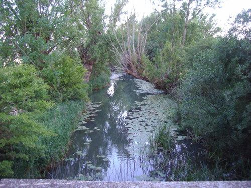 Rio Urbel 3